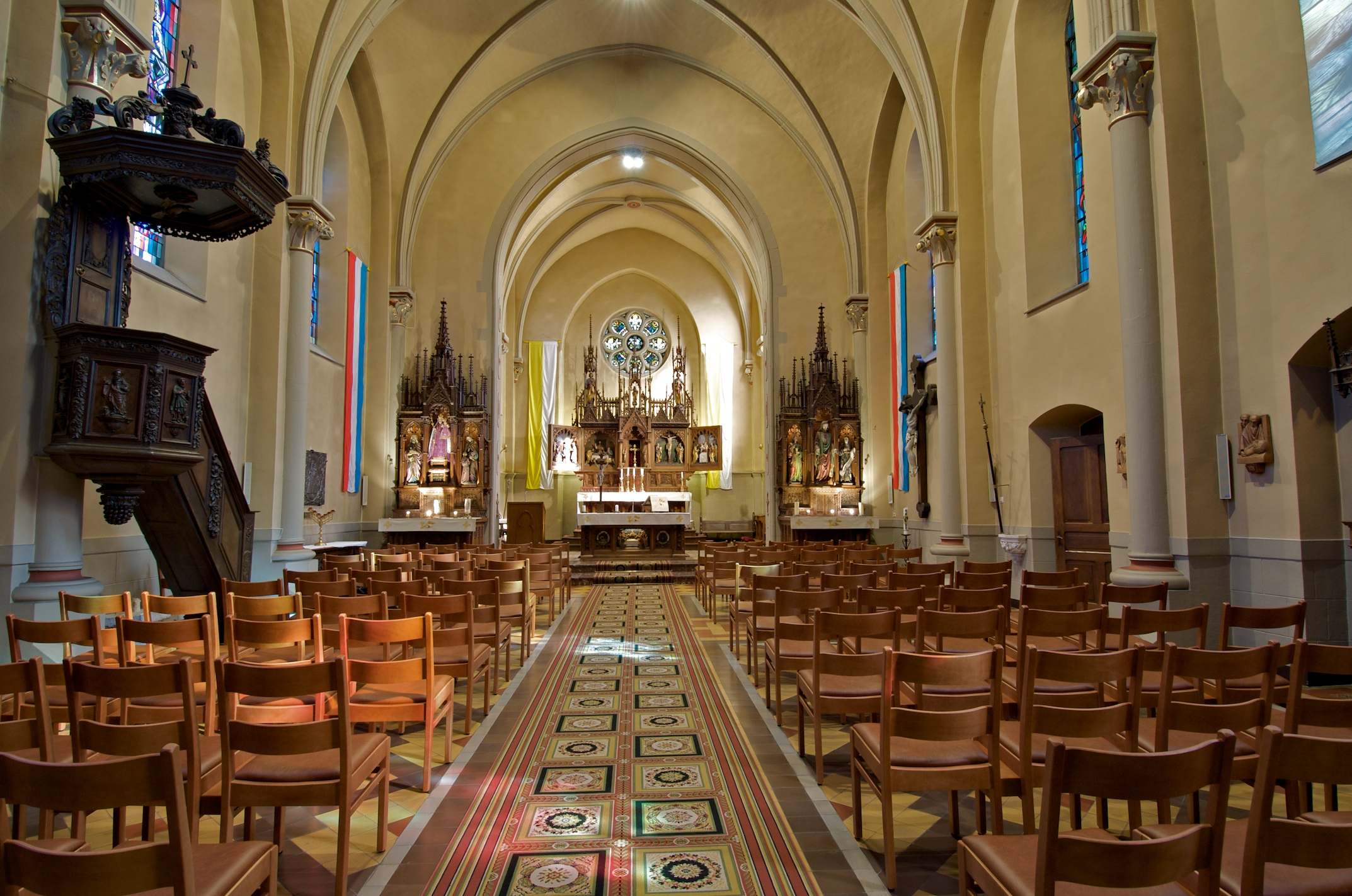 D'Kierch Meechtem vu bannen